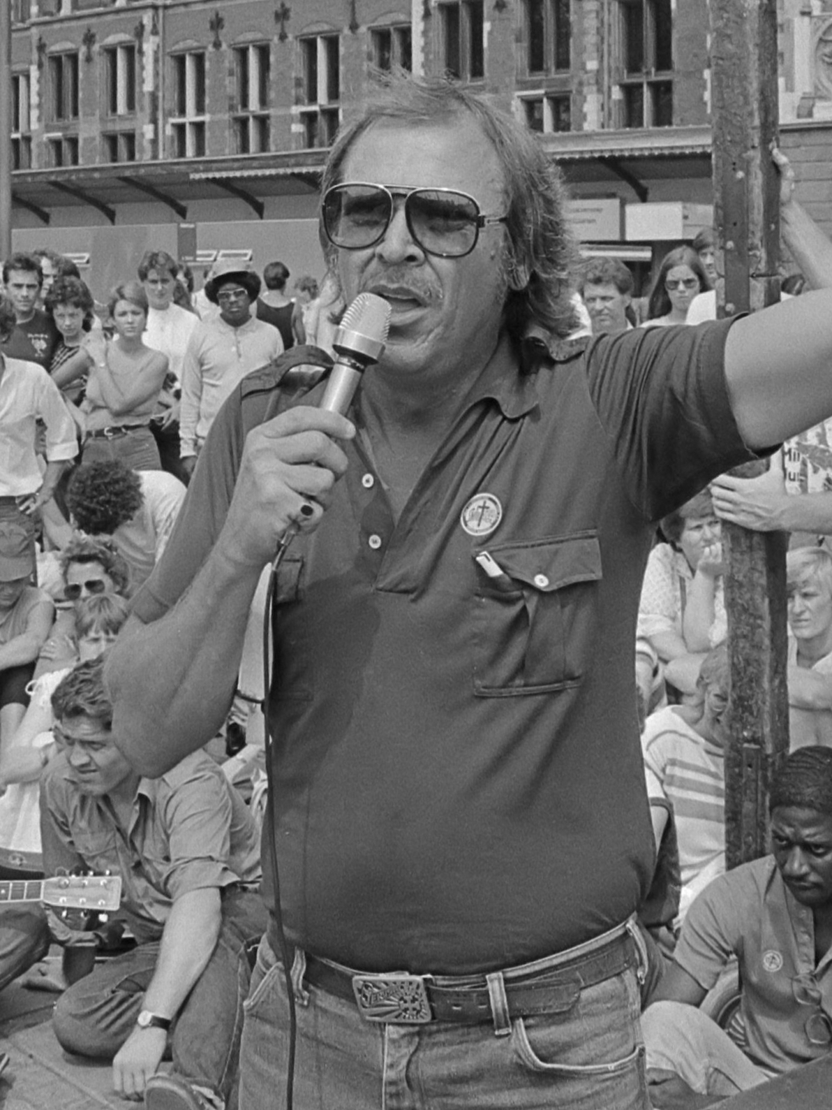 Internationale Conferentie voor reizende evangelisten in Amsterdam. Verkondiging door evangelist Arthur Blessit voor het Centraal Station; links een vertaler 16 juli 1983